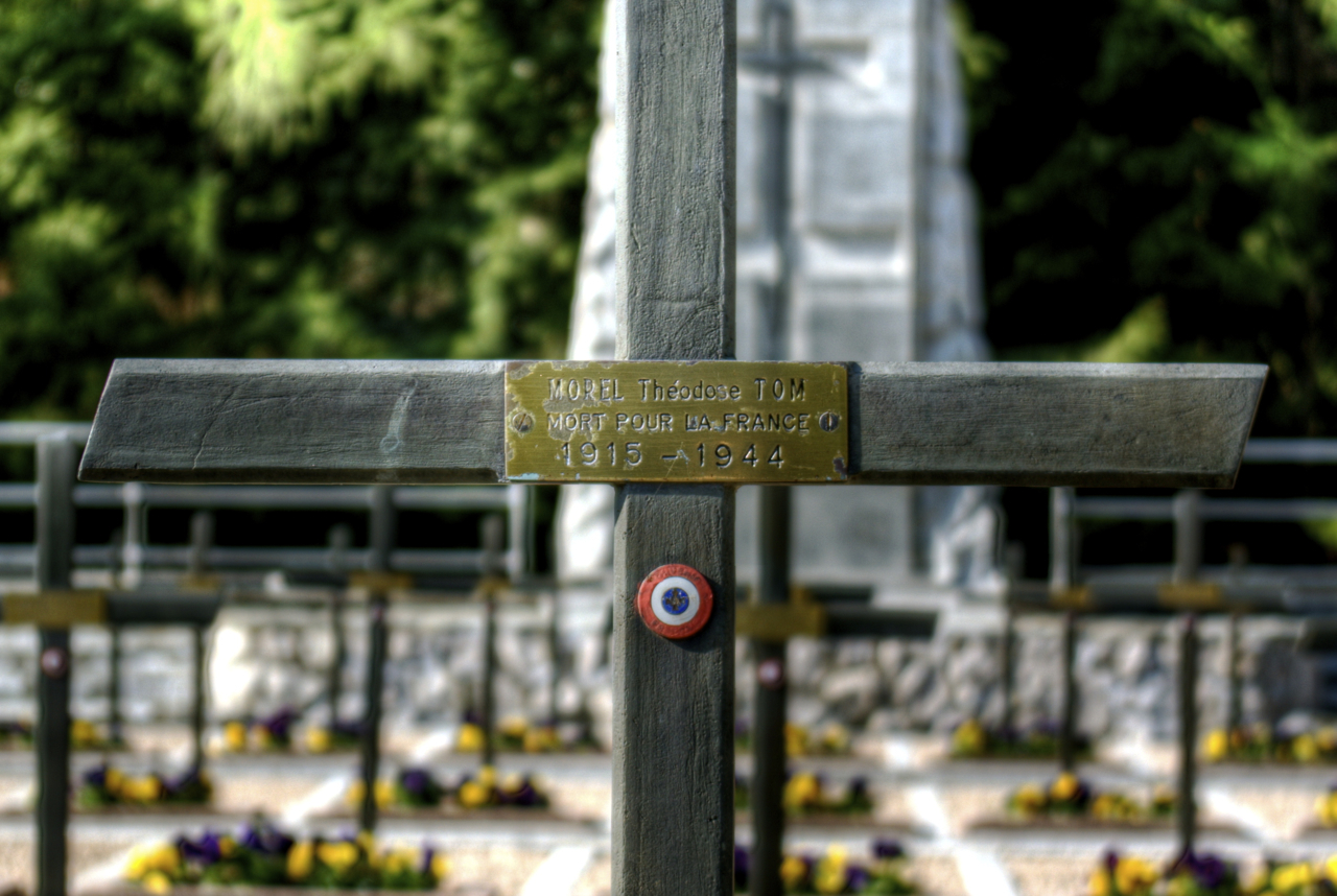 Tombe de Tom Morel à la Nécropole de Morette en 2009.